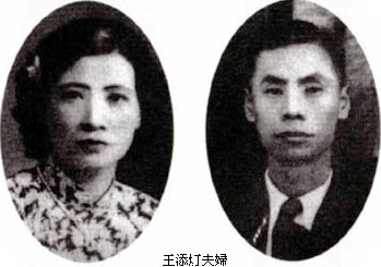 《人民導報》社長暨臺灣省參議會議員王添灯與其妻黃氏。